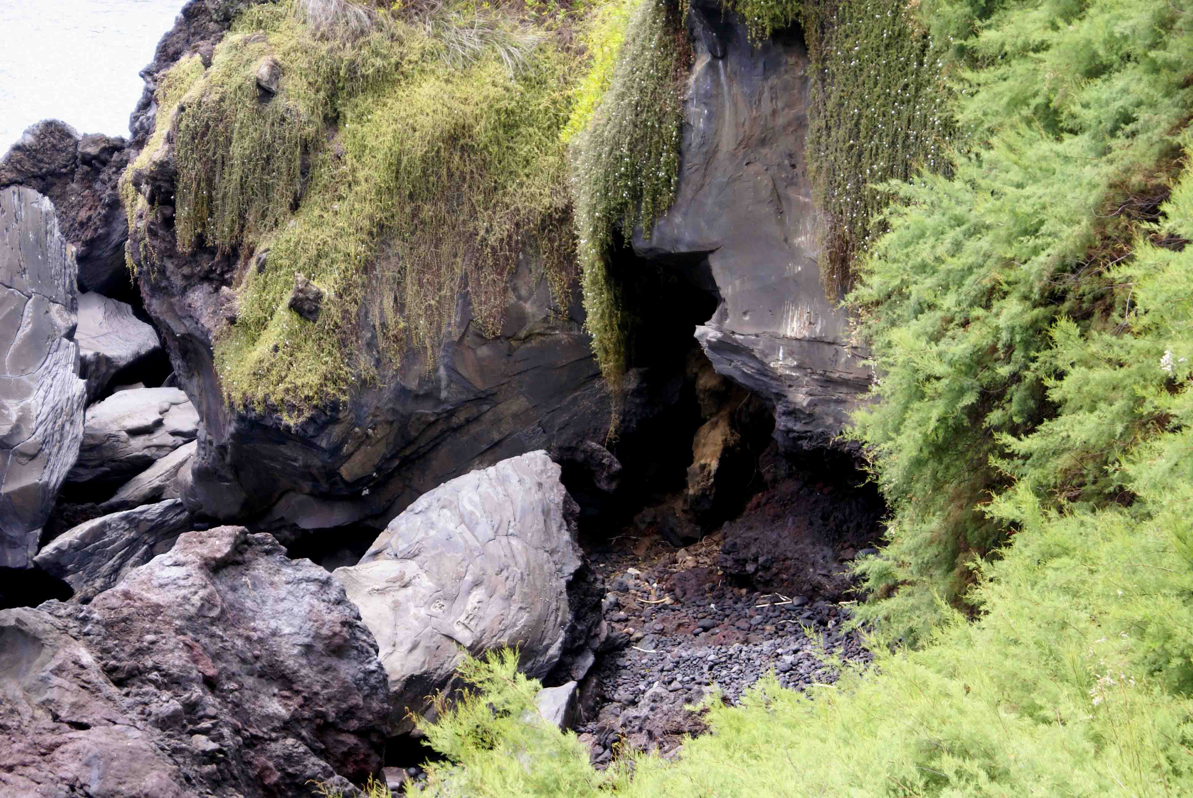 Enseada do Raulino - Grandes Pedras de Basálticas cobertas de Urze, Angra do Heroísmo.